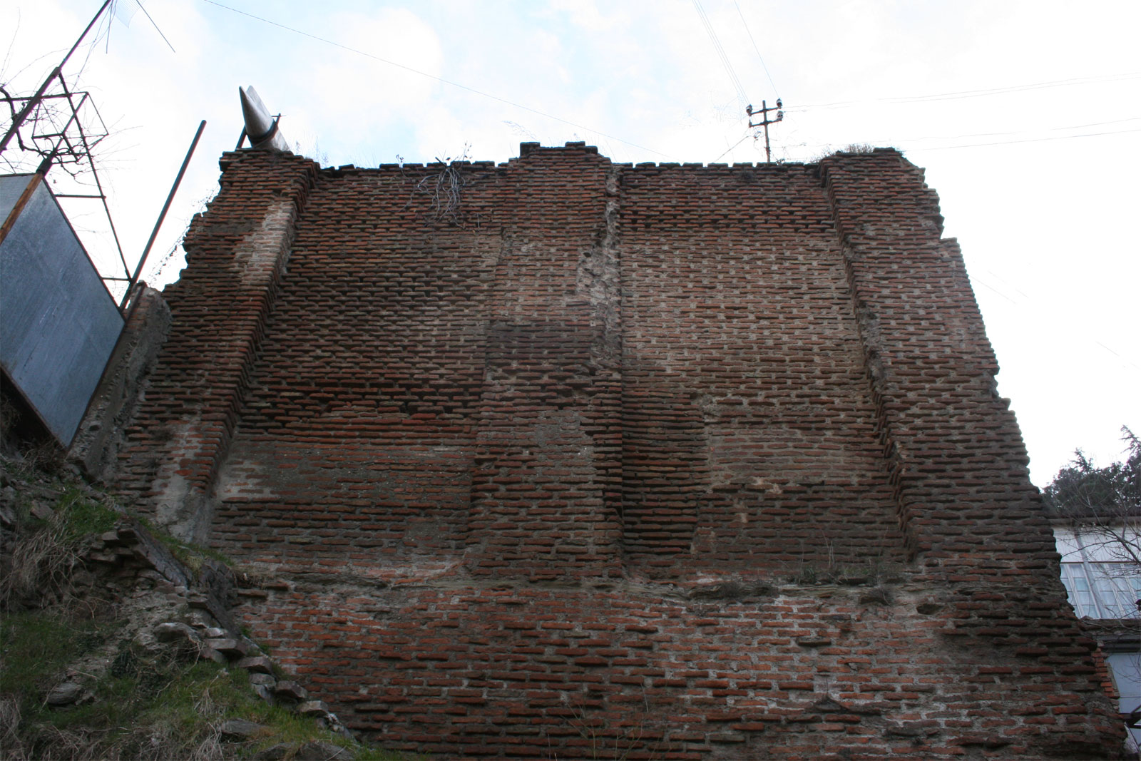 ათეშგა, ცეცხლის საგზებელი, ცეცხლთაყვანისმცემელთა საკერპე კლდისუბანში, თბილისი